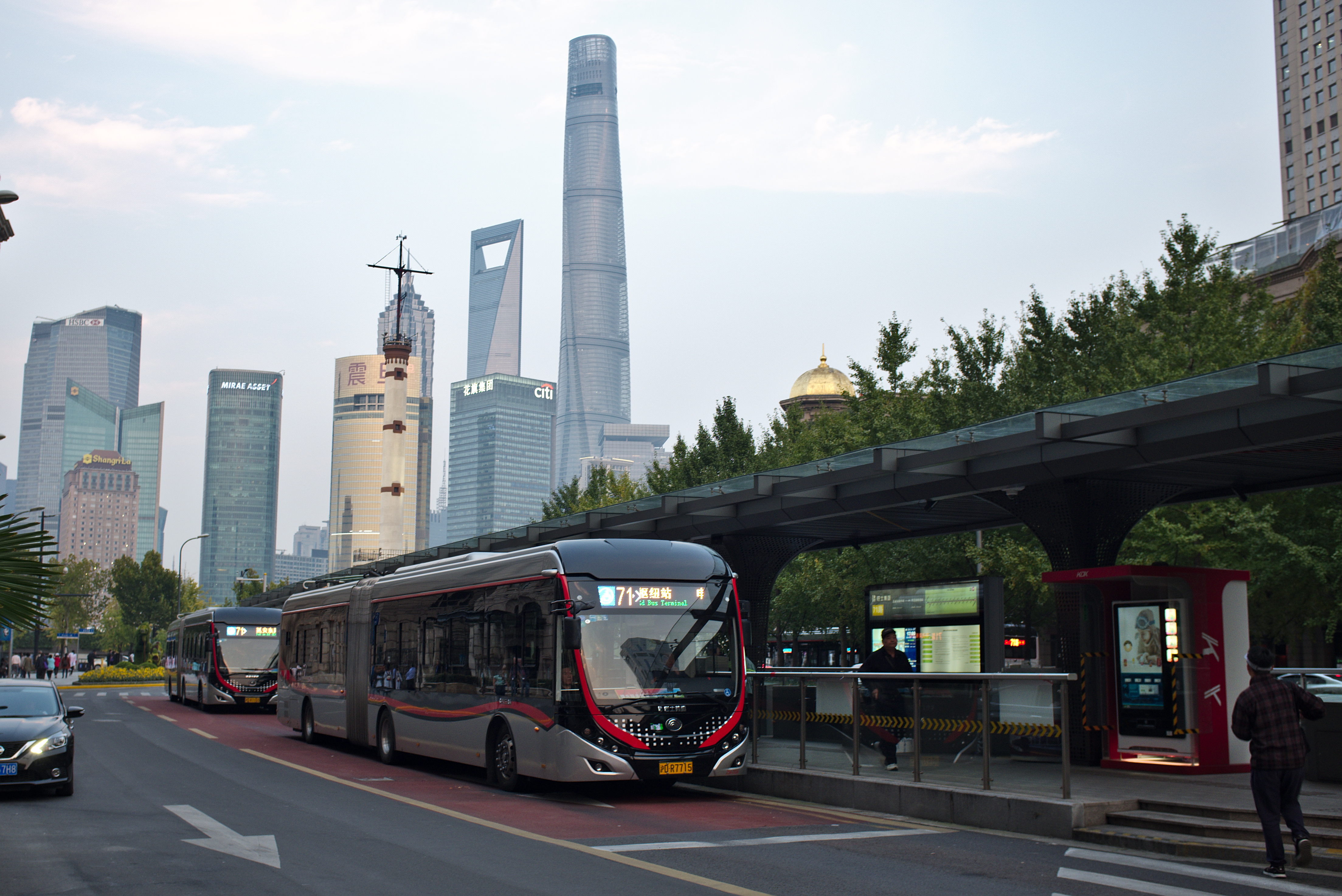 Shanghai